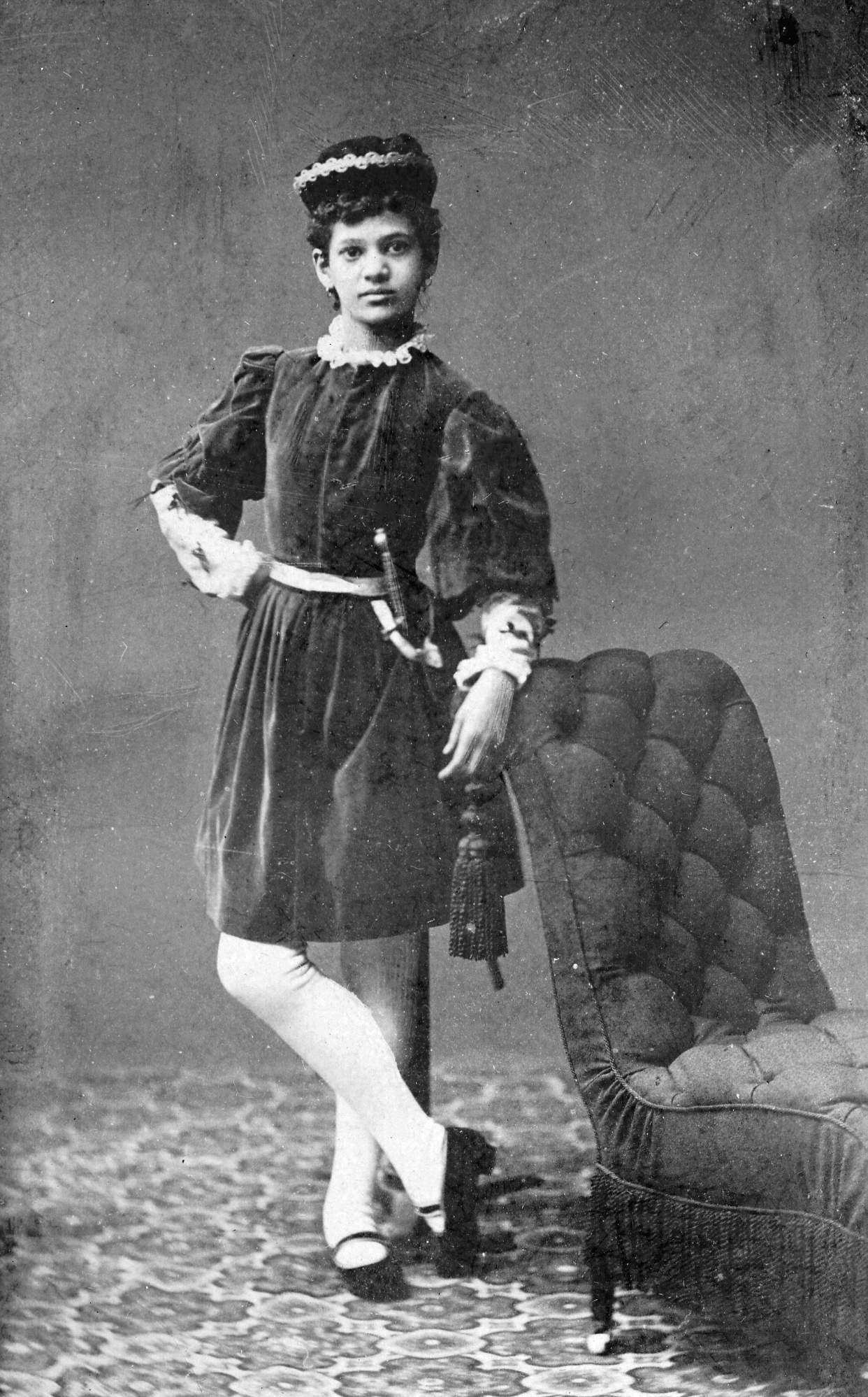 Ida Schylander, dansare vid Kungliga Operan 1888